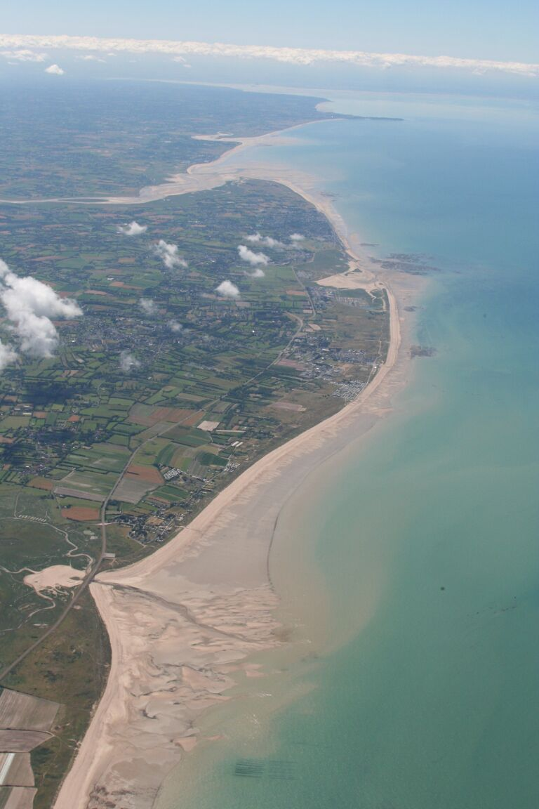 Vol en parachute avec notre avion Cessna 206. Vue partielle de la Côte des Havres et au loin (le plus au sud), on aperçoit la baie du Mont-Saint-Michel. Du nord (au premier plan) au sud (arrière-plan), on distingue : le havre de Geffosses ; le havre de Blainville-sur-Mer ; le havre de Regnéville-sur-Mer et l'estuaire de la Sienne ; le havre de la Vanlée ; Granville, la pointe du Roc (ou cap Lihou) ; la baie du Mont-Saint-Michel.